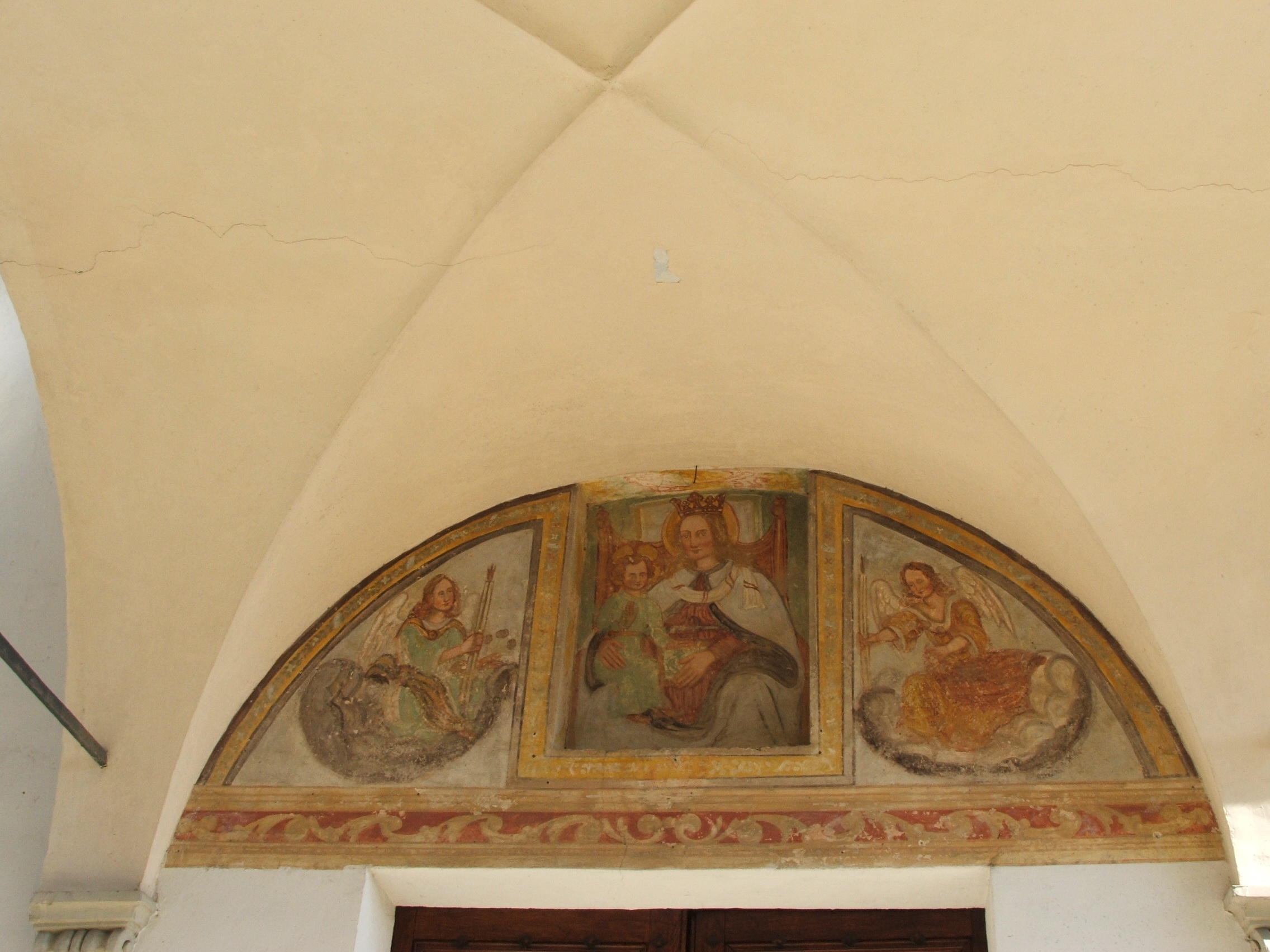 Santuario di Banchette a Bioglio (provincia di Biella, Piemonte, Italia) 6